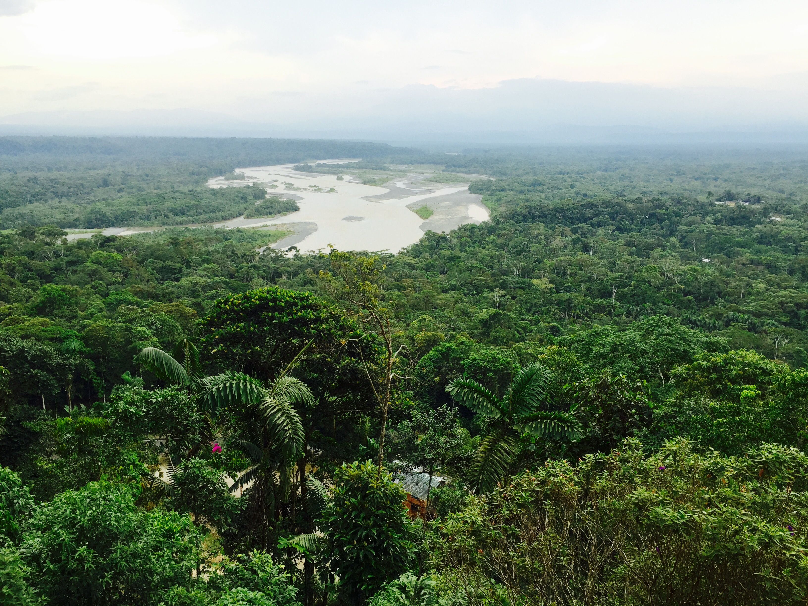 La vista del mirador Indichuris cerca de Puyo, Ecuador